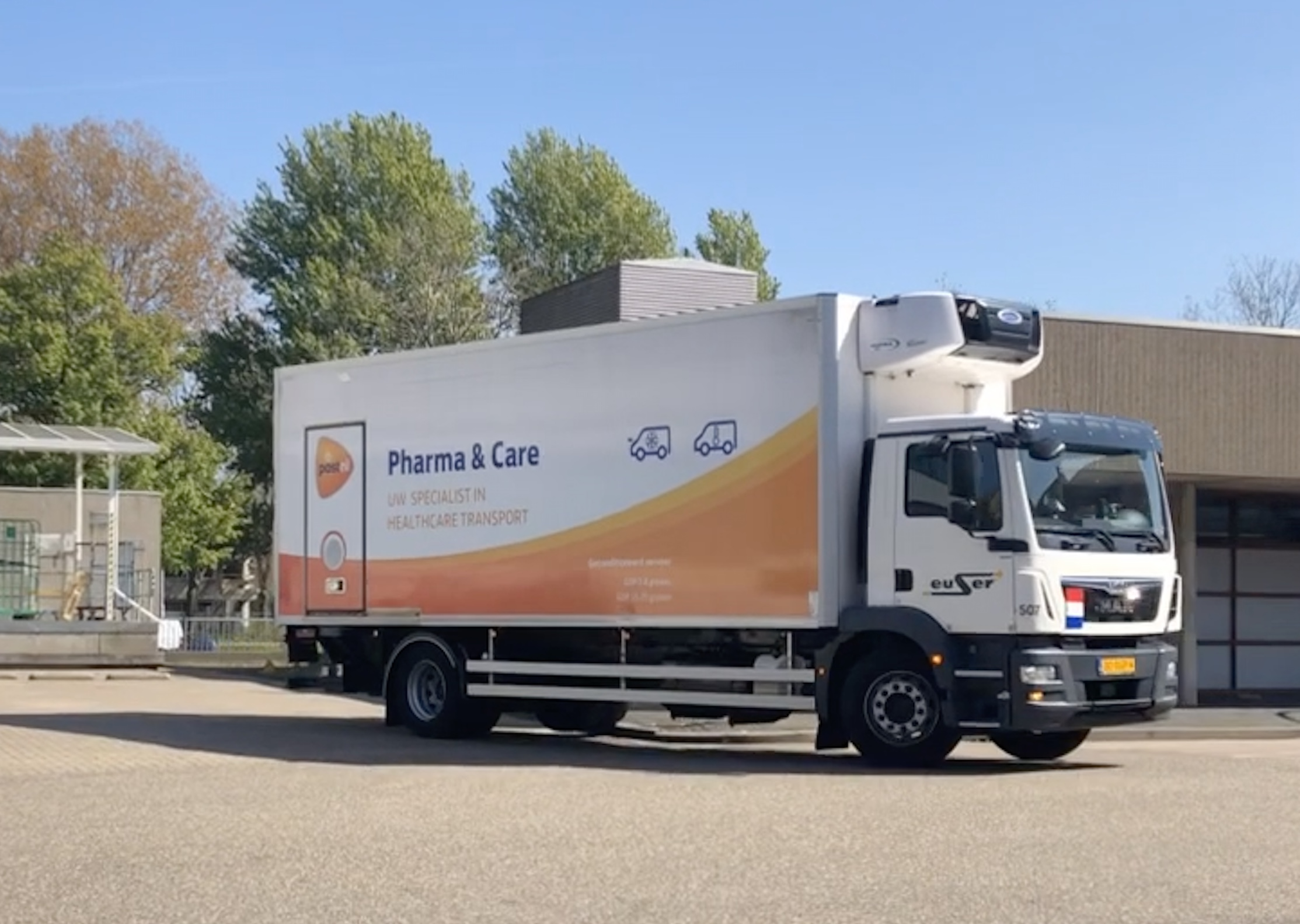 vrachtwagen van PostNL Pharma & Care bij Spaarne Gasthuis